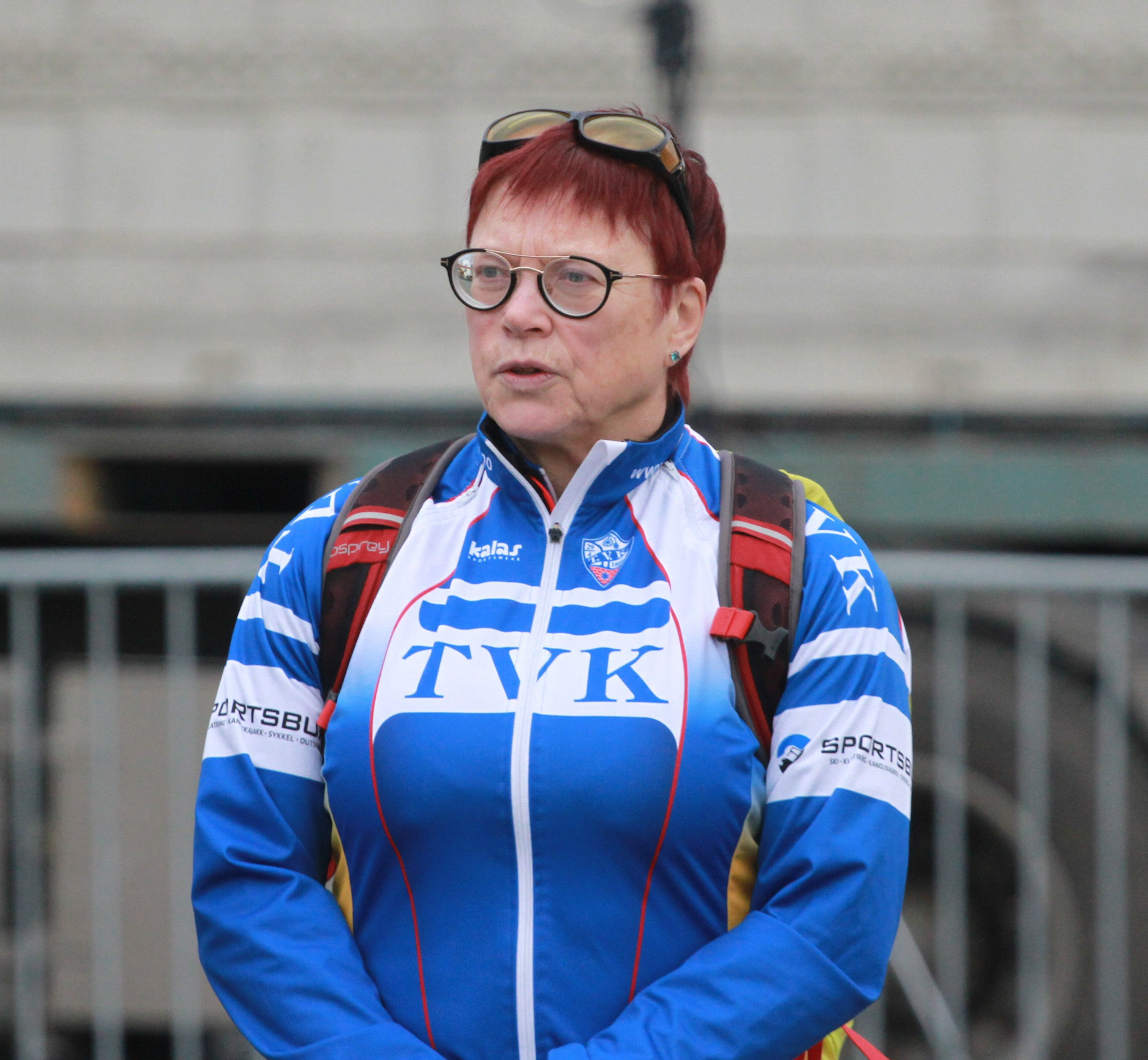 Politikeren Anne Sophie Hunstad.